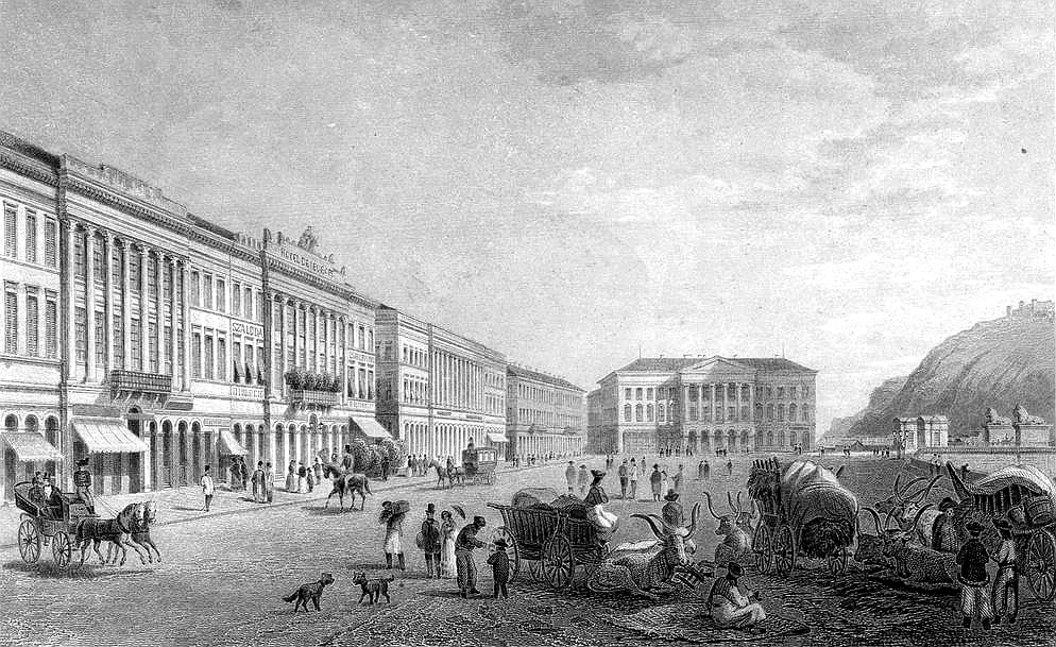 Feldunasor Peste, acélmetszet. A kép az Akadémia épülete felől a Lloyd palotáig terjedő térséget ábrázolja. A kép jobb szélén a Lánchíd pesti hídfője. Előtérben ökrösszekerek. A kép jobb oldalán a gróf Széchenyi István által 1827-ben alapított Nemzeti Casino épülete.